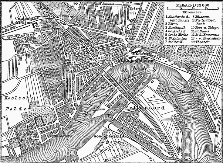 Situationsplan von Rotterdam (1 : 35 000)